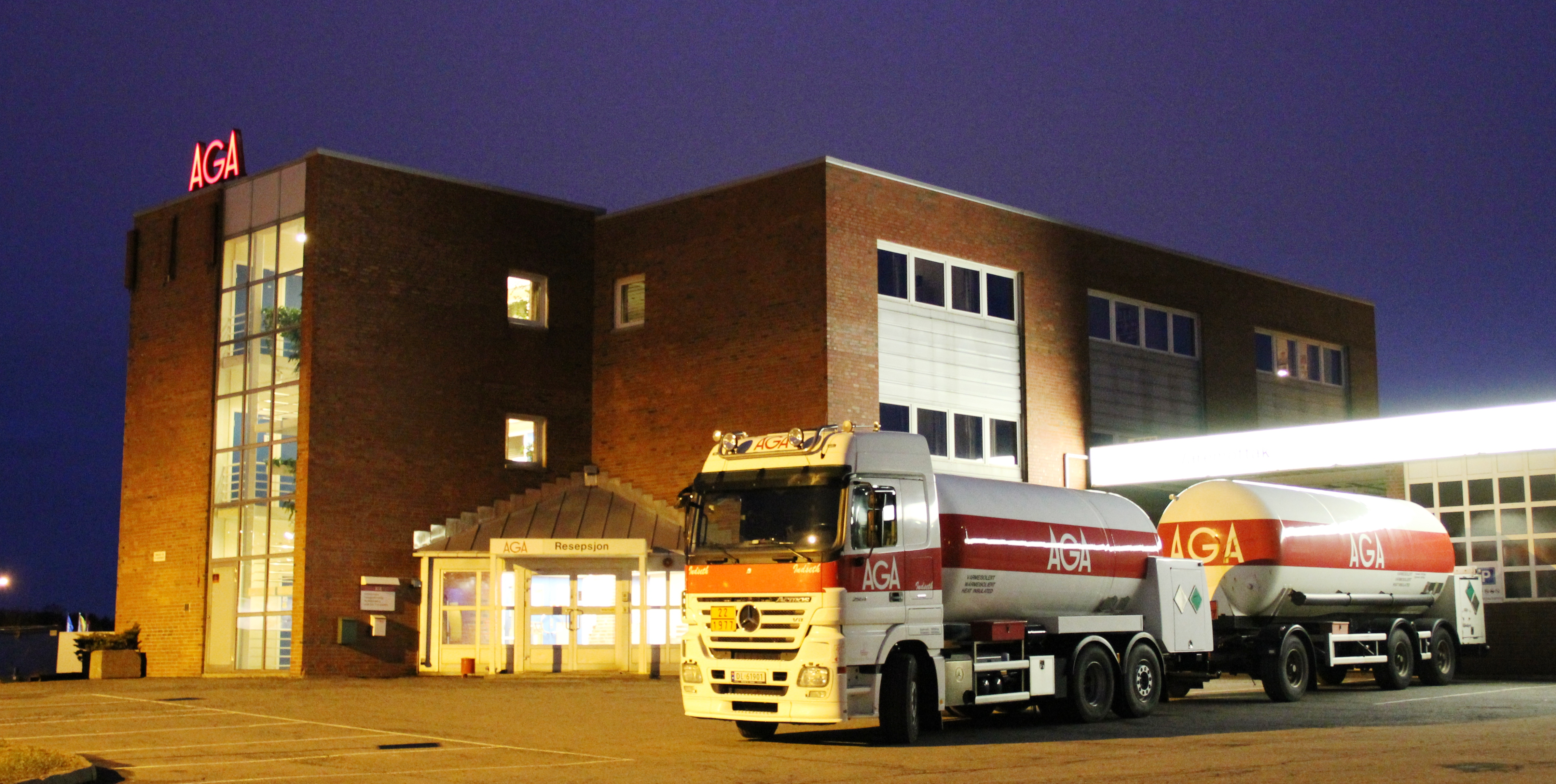 AGA Furuset, Oslo